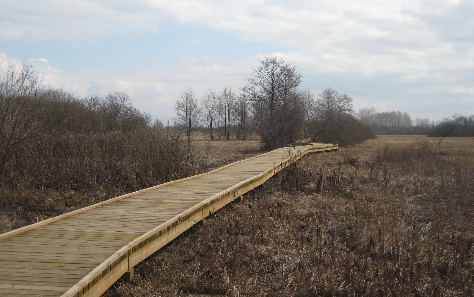 Koščeva učna pot, Ljubljansko Barje